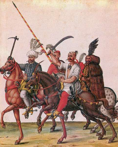 Portyázó törökök Szerkesztette: Brigitte Valcha: A Habsburgok. Egy európai dinasztia története. Gulliver Kiadó, Budapest, 1995, 165. oldal.